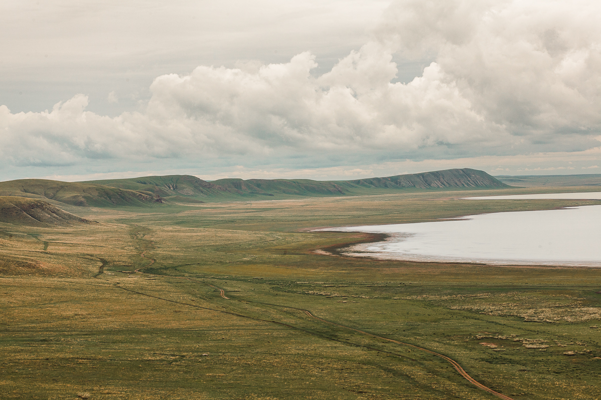 Даурский заповедник, Борзинский район This image is related to the protected area of Russia number 7500021